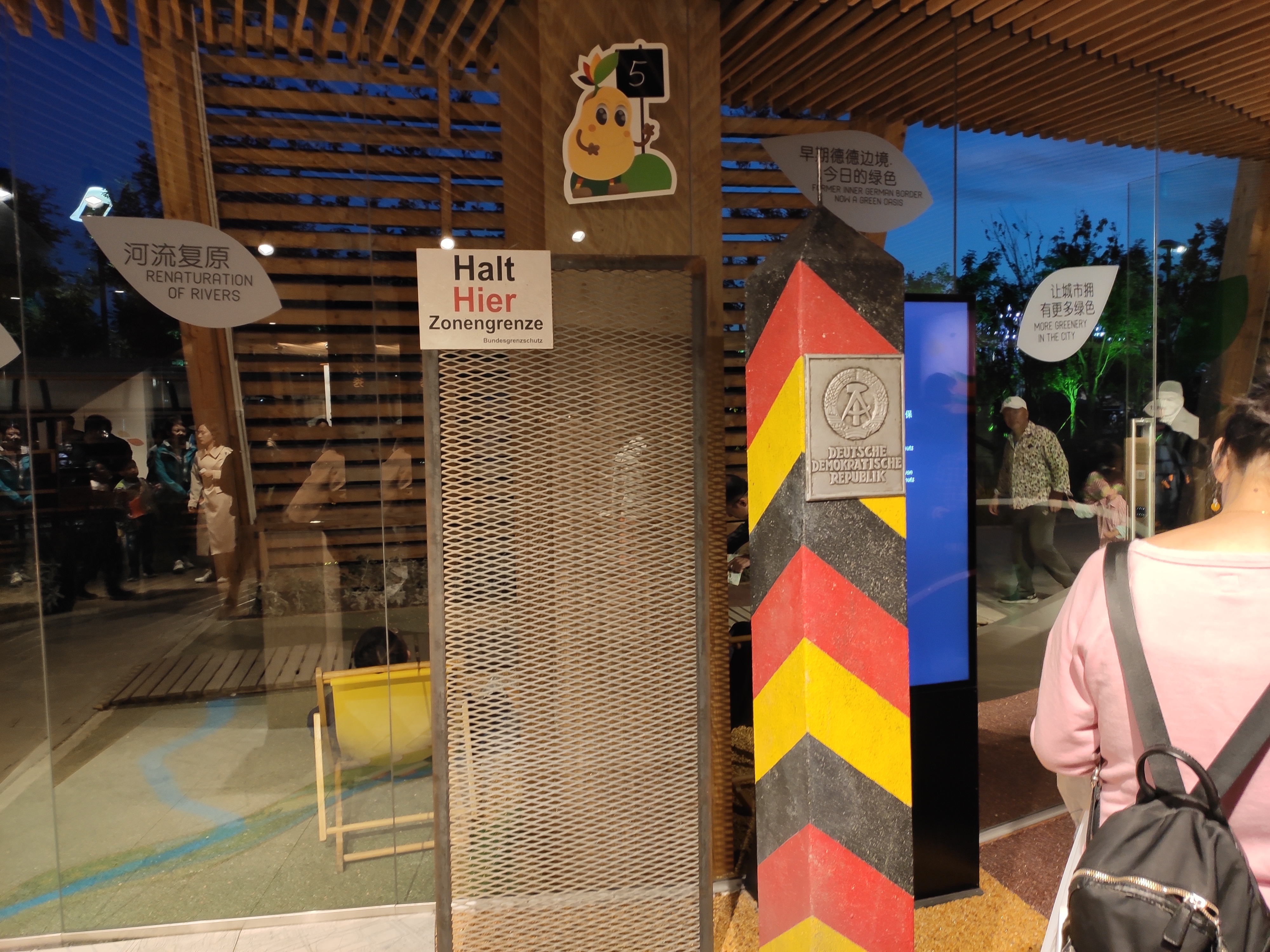 精 东 德 震 怒